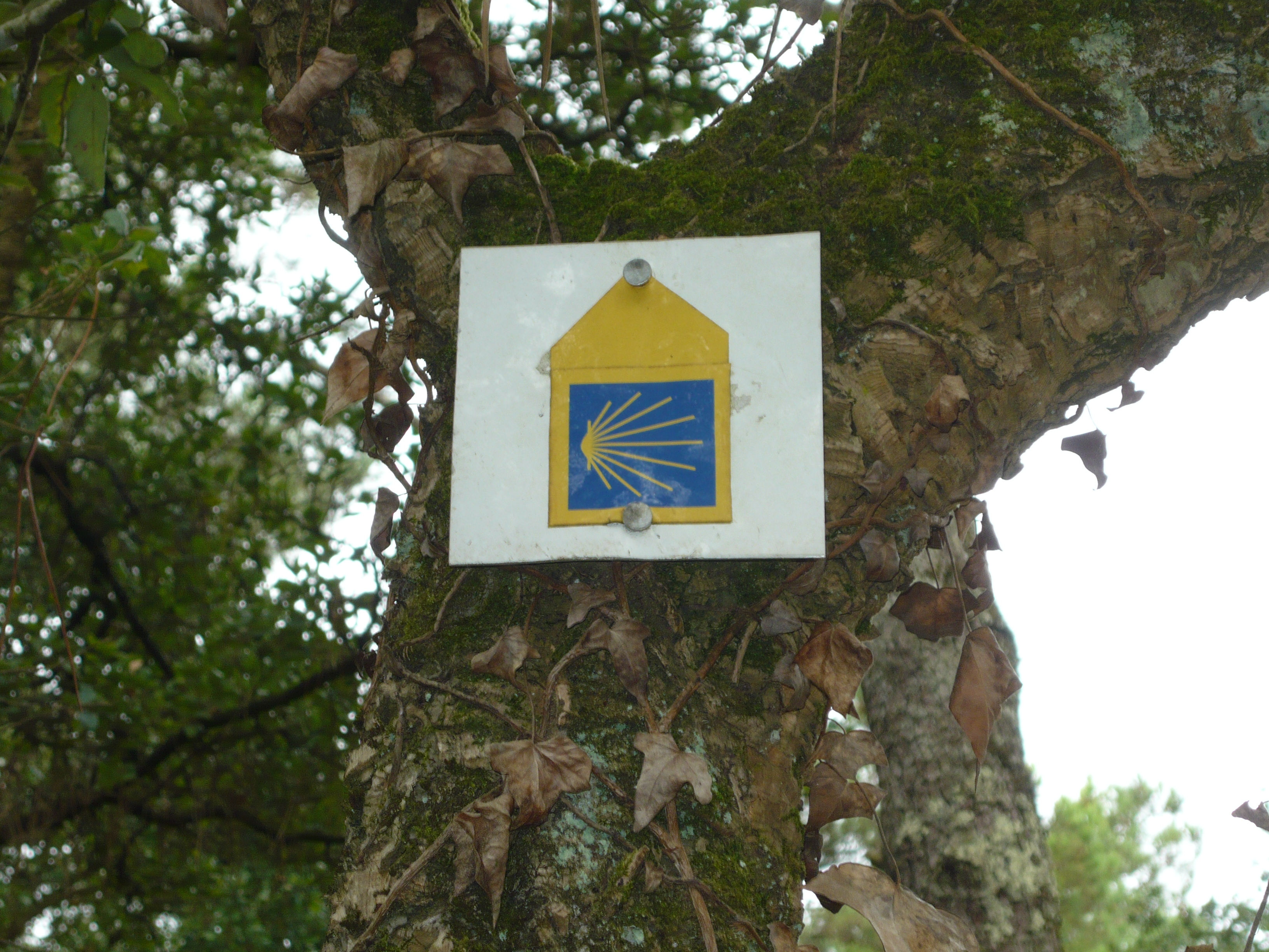 Signalétique Chemin vers plage du Metro